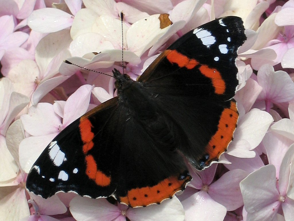 Vanessa atalanta, picture taken by Tim Bekaert, August 20, 2004, Belgium.